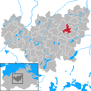 Groß Wüstenfelde in Mecklenburg-Vorpommern - District Güstrow